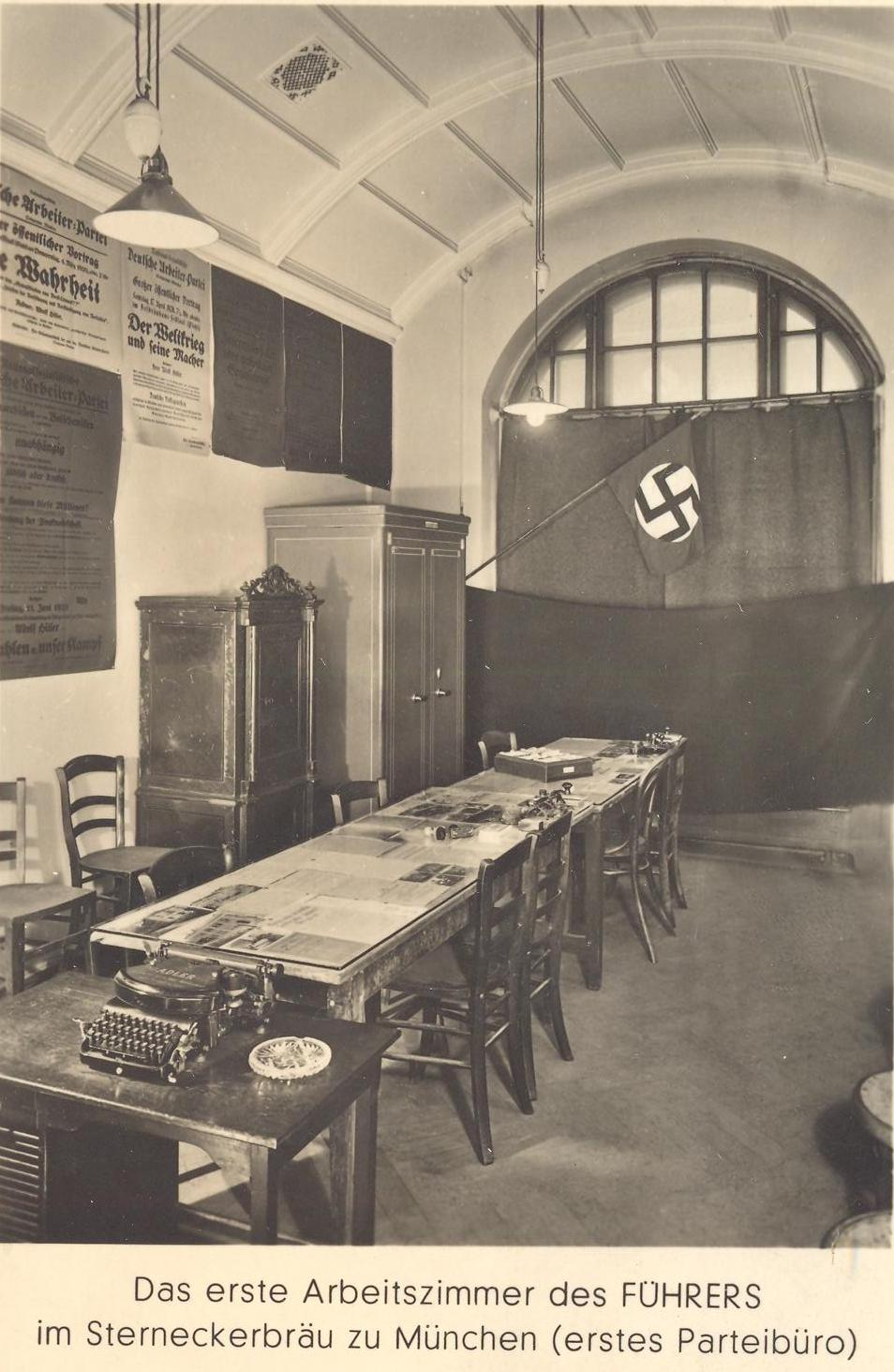 "Das erste Arbeitszimmer des FÜHRERS im Sterneckerbräu zu München (erstes Parteibüro)"